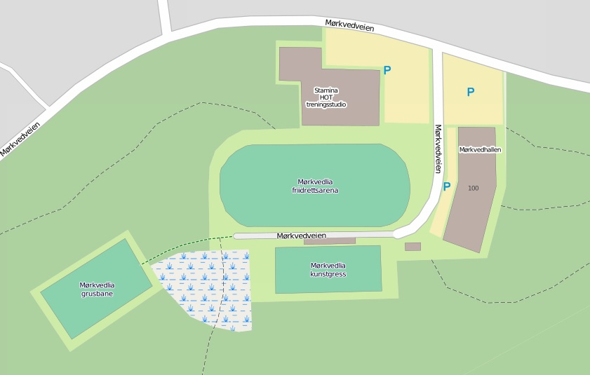 Kart over Mørkvedmarka Idrettspark